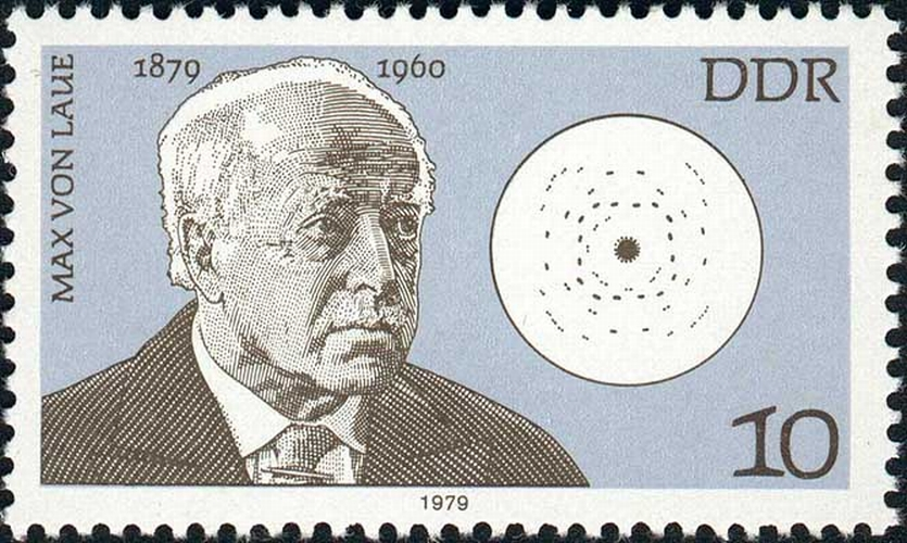 Max von Laue (1879–1960), physicien allemand (prix Nobel 1914).